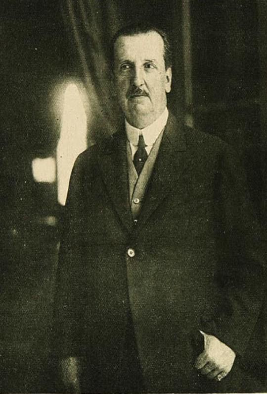 Emilio Bello Codecido, (1868-1941). Abogado Chileno, ejerció temporalmente el mando del país en 1925.